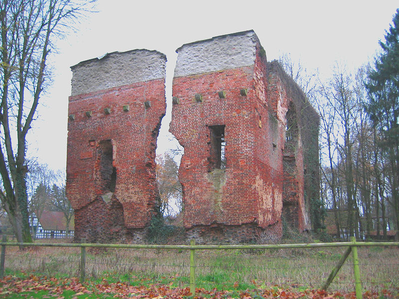 Die Burgruine der Burg Rahden in Rahden im Herbst 2008